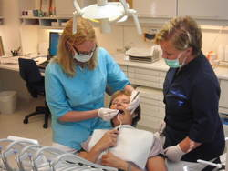 Behandling av pasient på tannklinikk